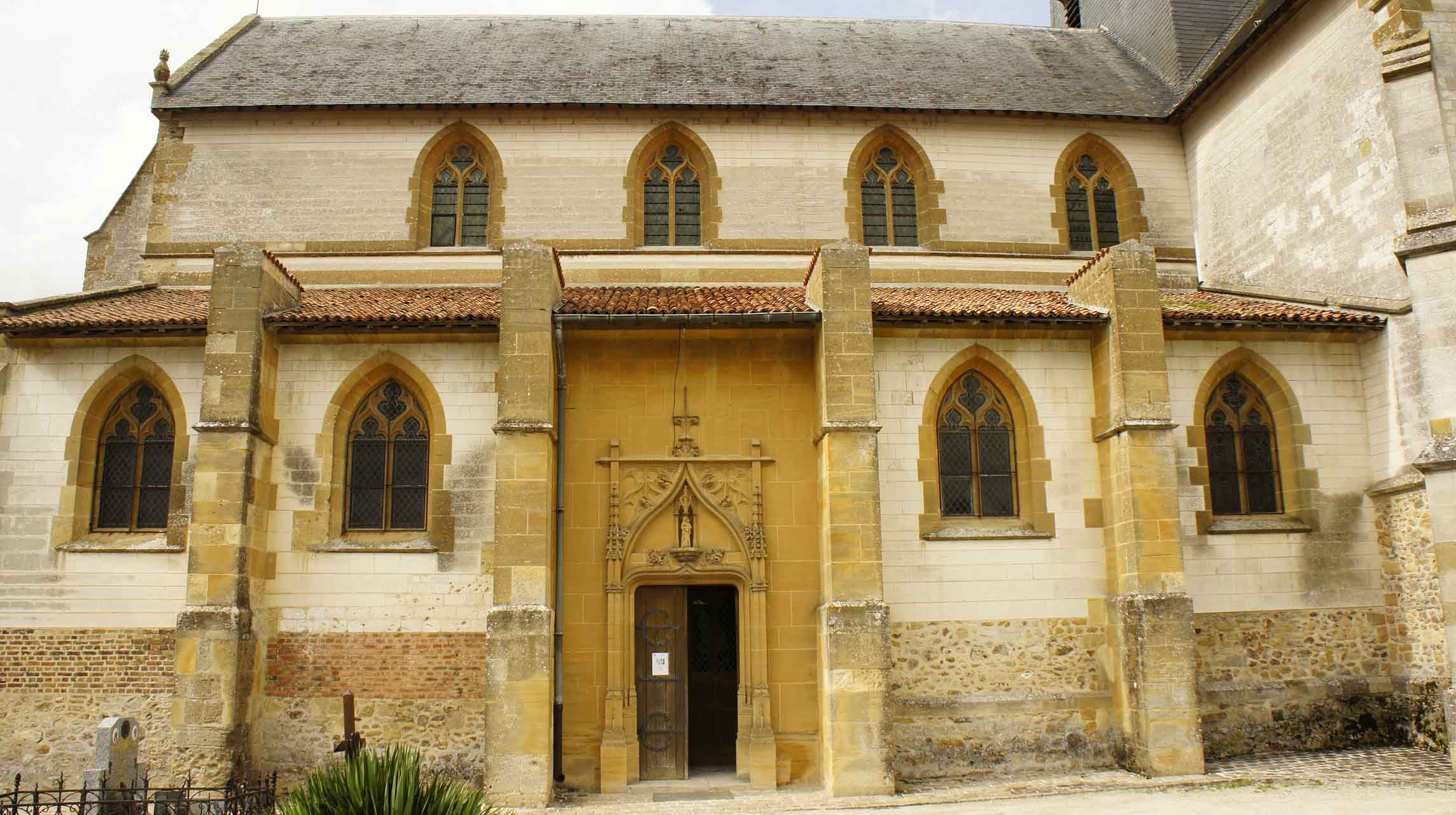 Vue du transept du côté sud de l'Église Saint-Martin de Sommepy-Tahure.